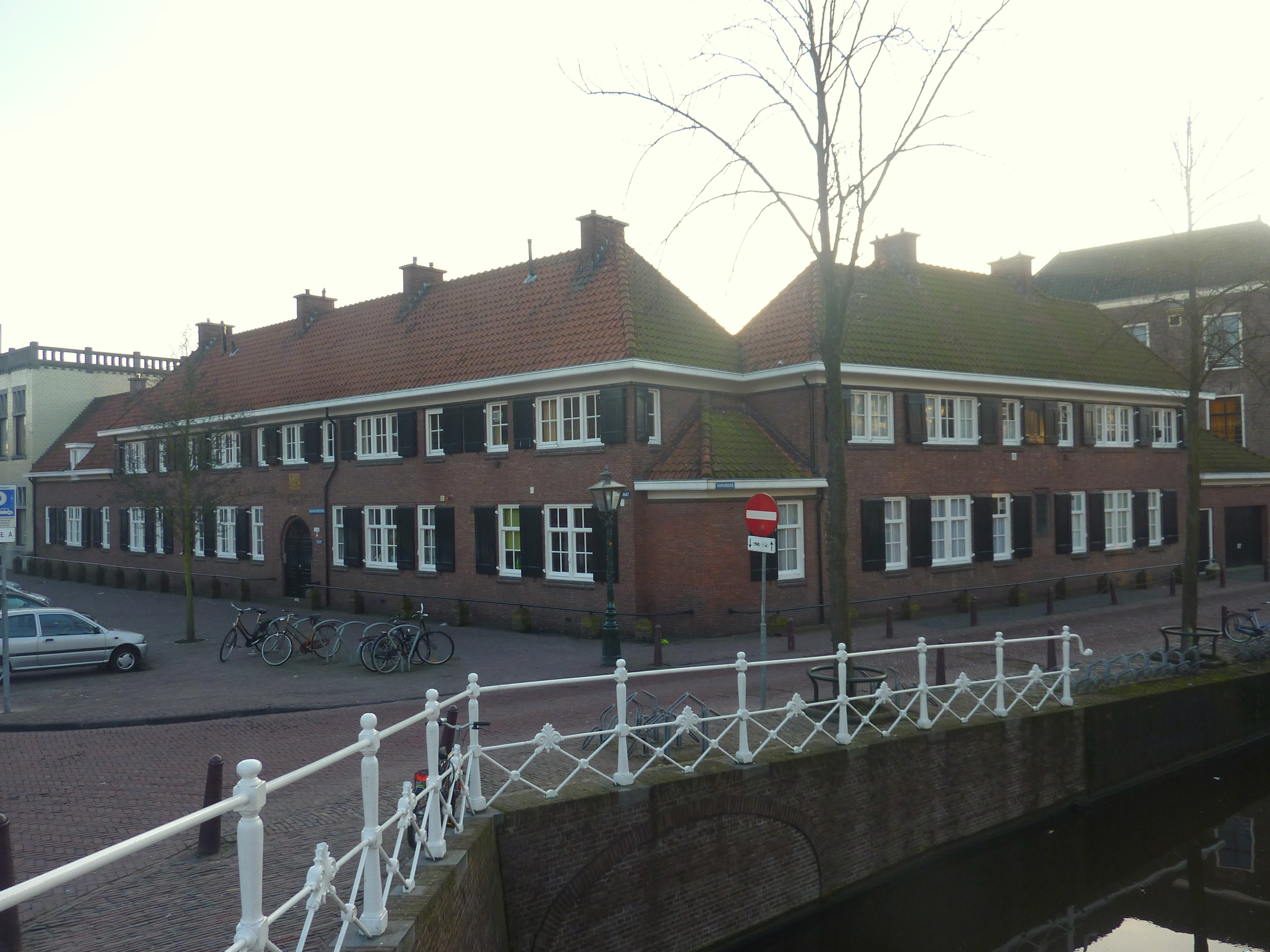 Leiden, Rapenburg Leiden - Doezastraat - Heiligengeesthofje 1-16a